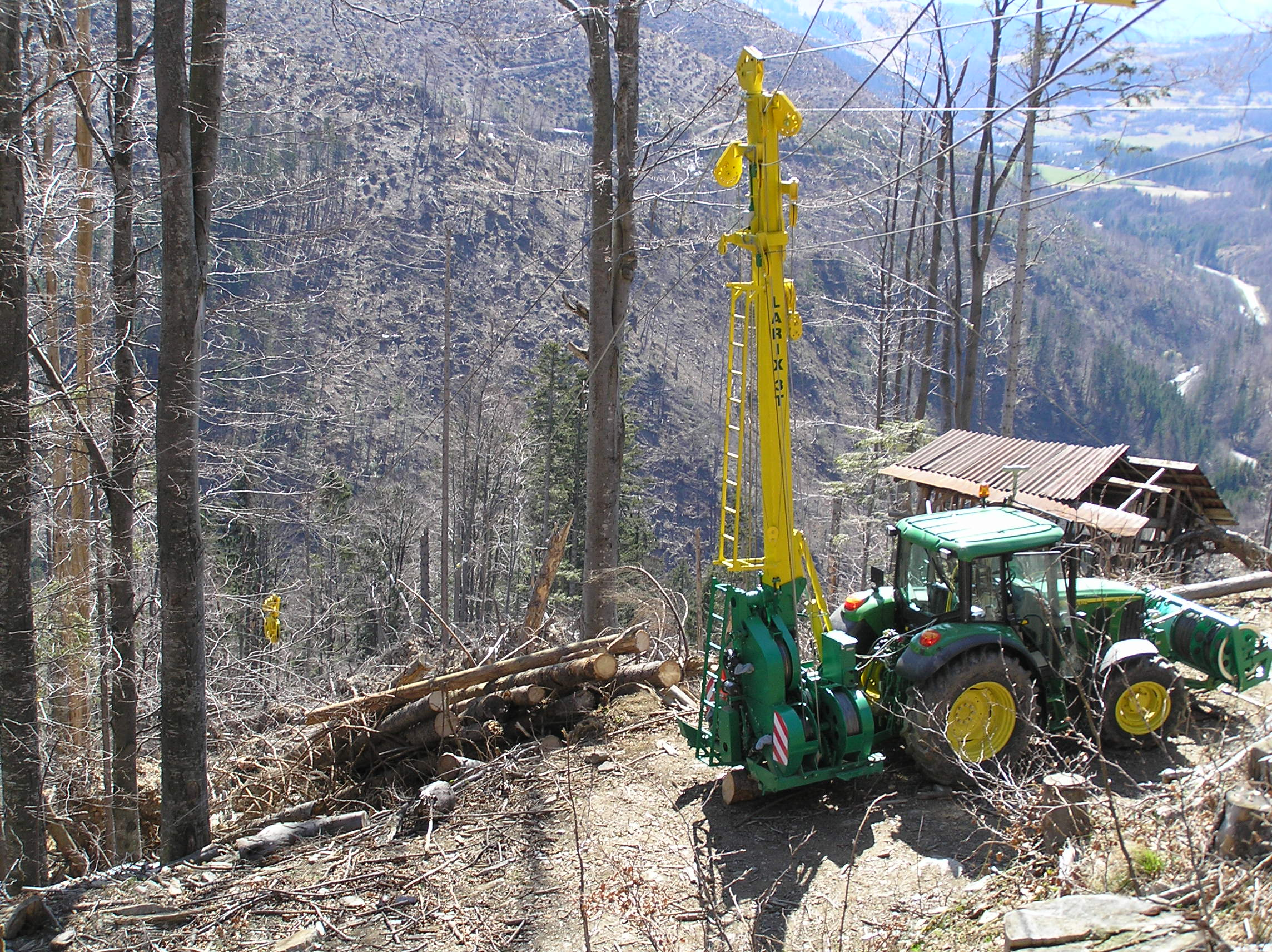 Câble-mât Larix 3T, monté sur un tracteur agricole (John Deere 6320 likely).